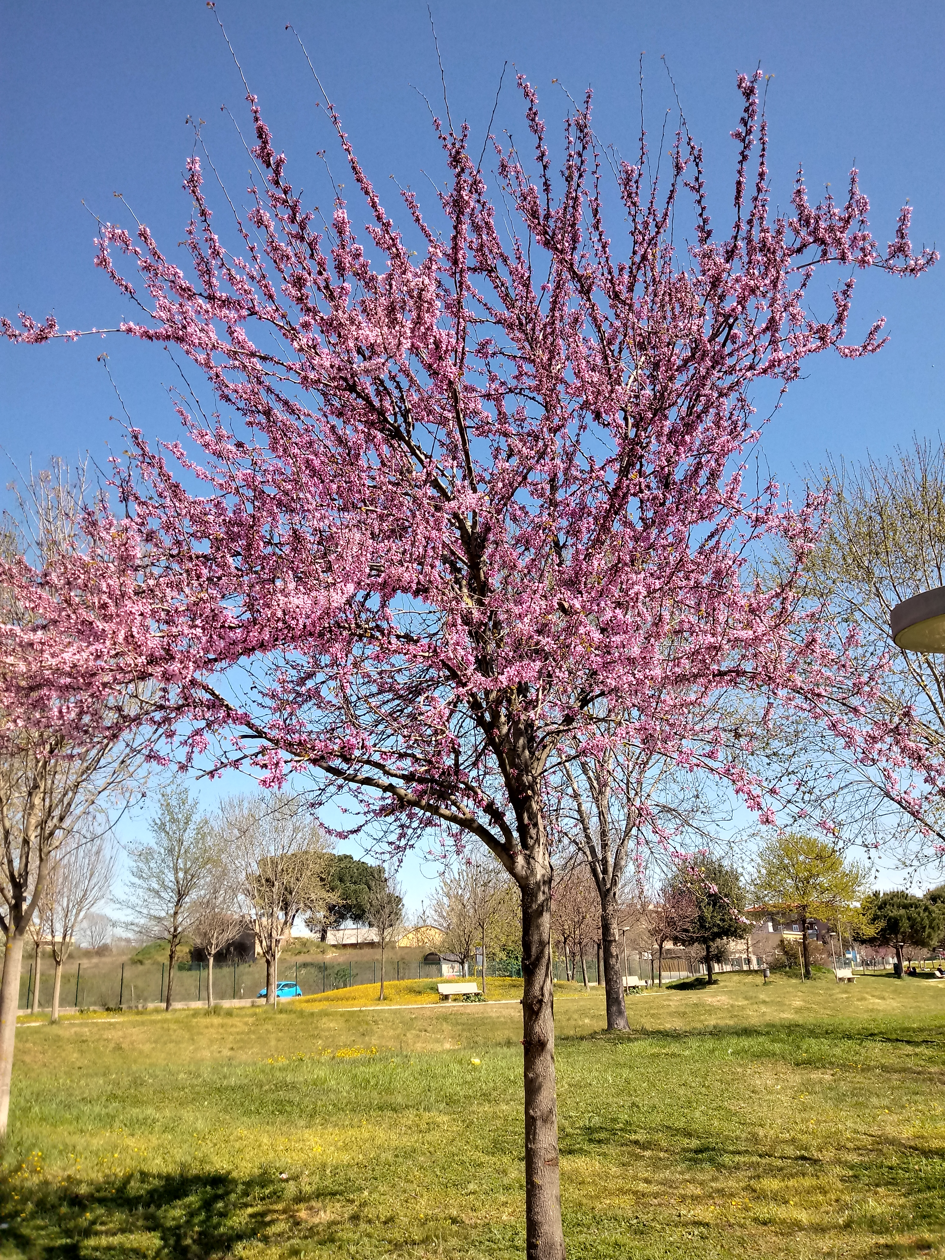 Prunus Persica in Rome